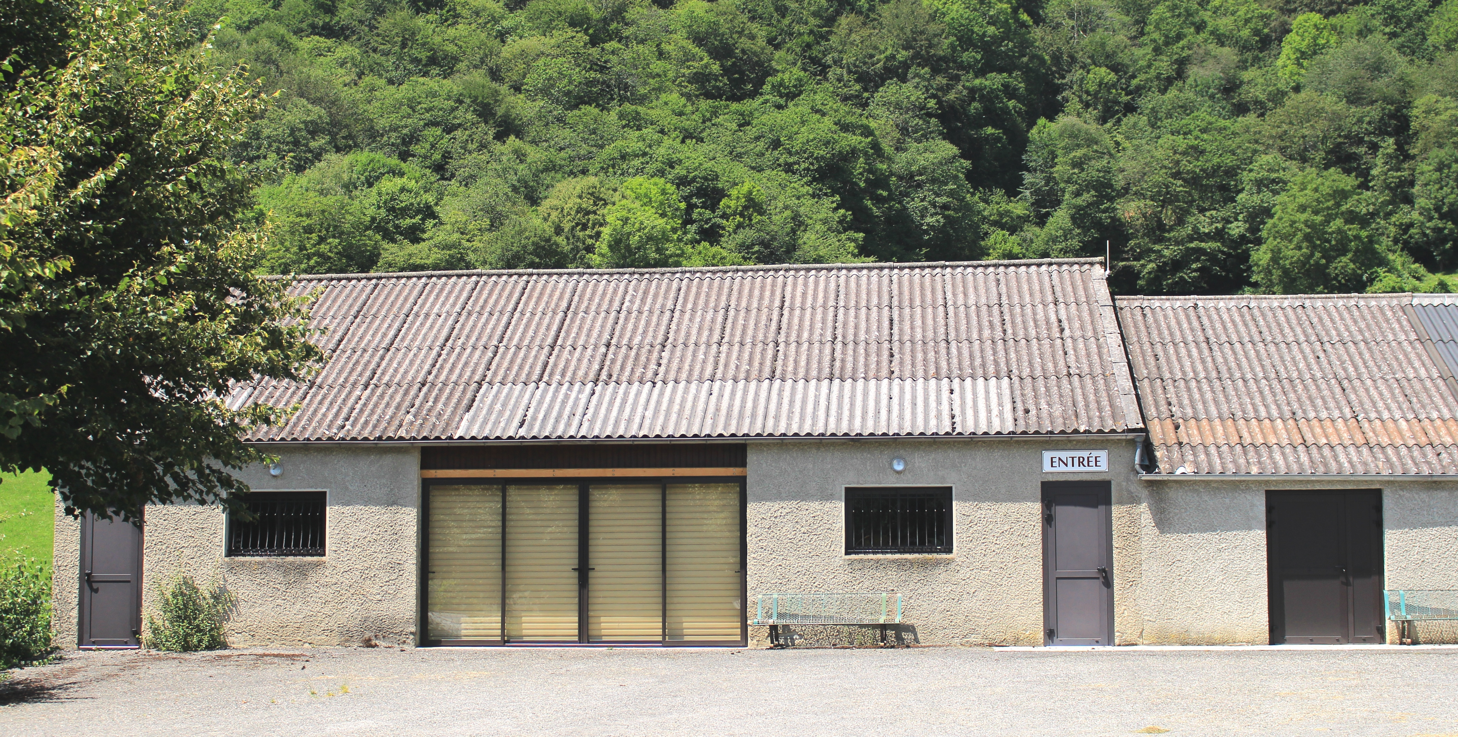 Salle des fêtes de Bulan (Hautes-Pyrénées)